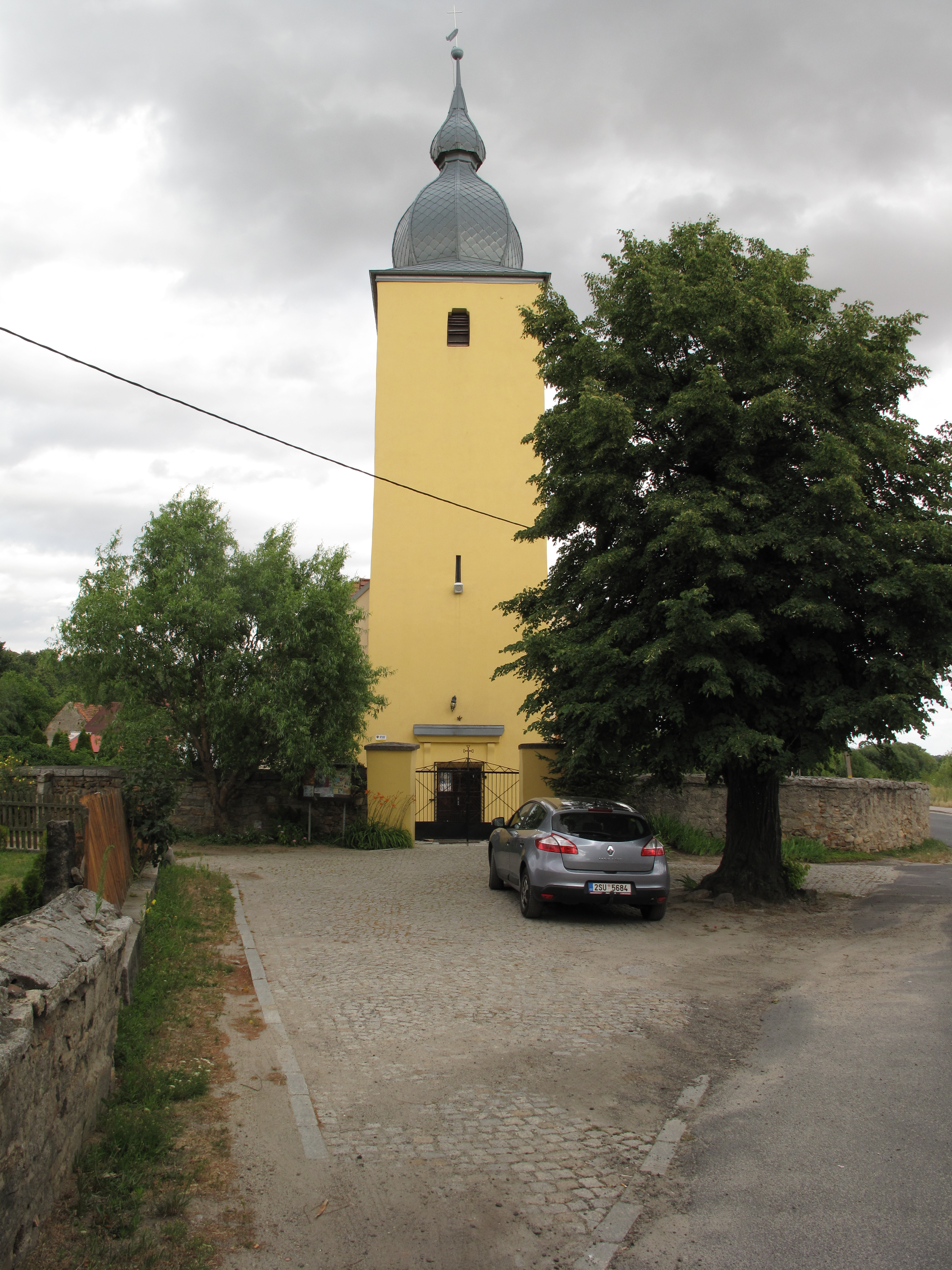 Kostrza (województwo dolnośląskie). Polska.